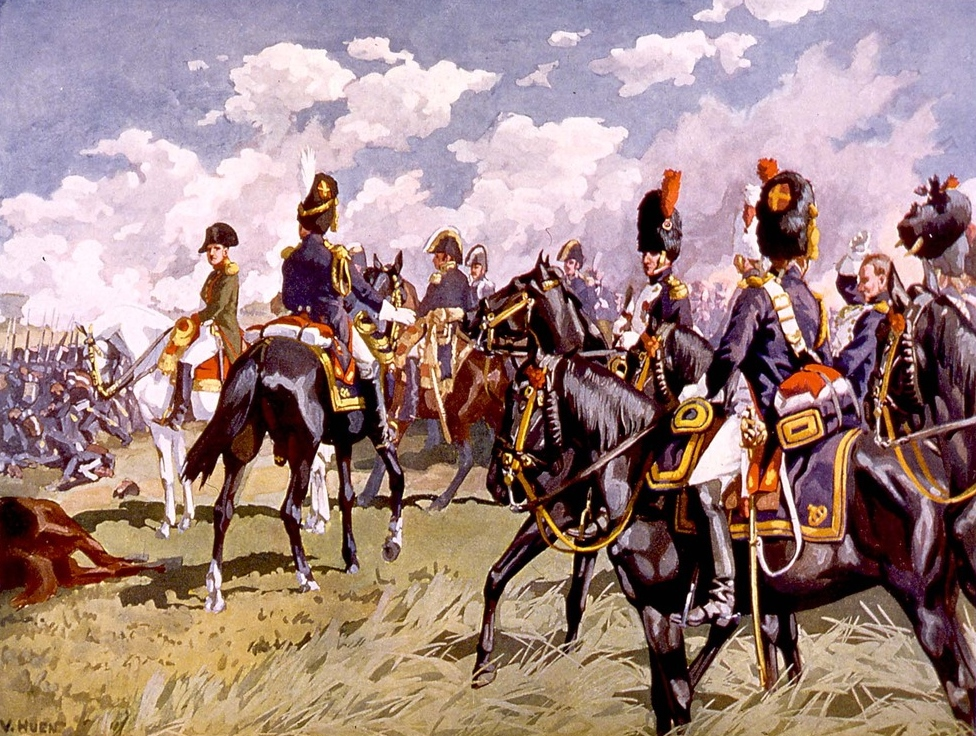 Le général Frédéric Henri Walther, colonel des grenadiers à cheval de la Garde impériale, supplie Napoléon de se retirer derrière les lignes françaises. Épisode de la bataille d'Essling, les 21 et 22 mai 1809.